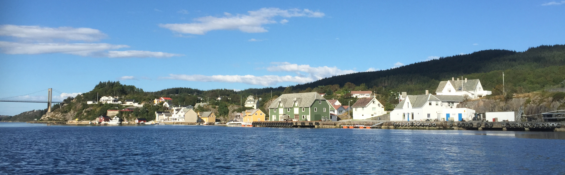 Steinsland i Sund kommune